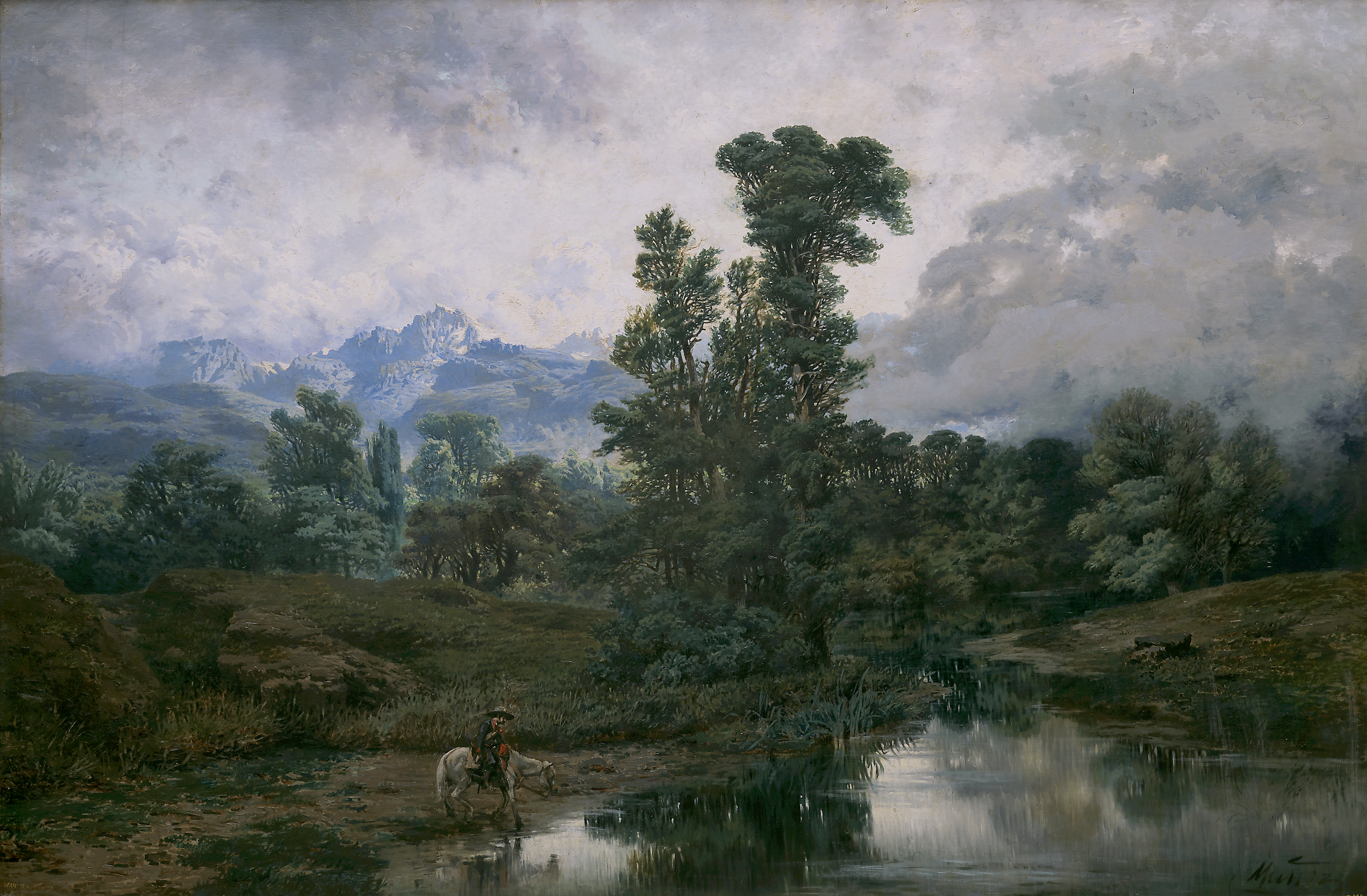 En primer plano, uno de los guardas de la reserva del Monte de El Pardo (coto de caza de la Monarquía Española). Al fondo el Guadarrama, con aspecto más alpino y enriscado de lo que es en realidad.